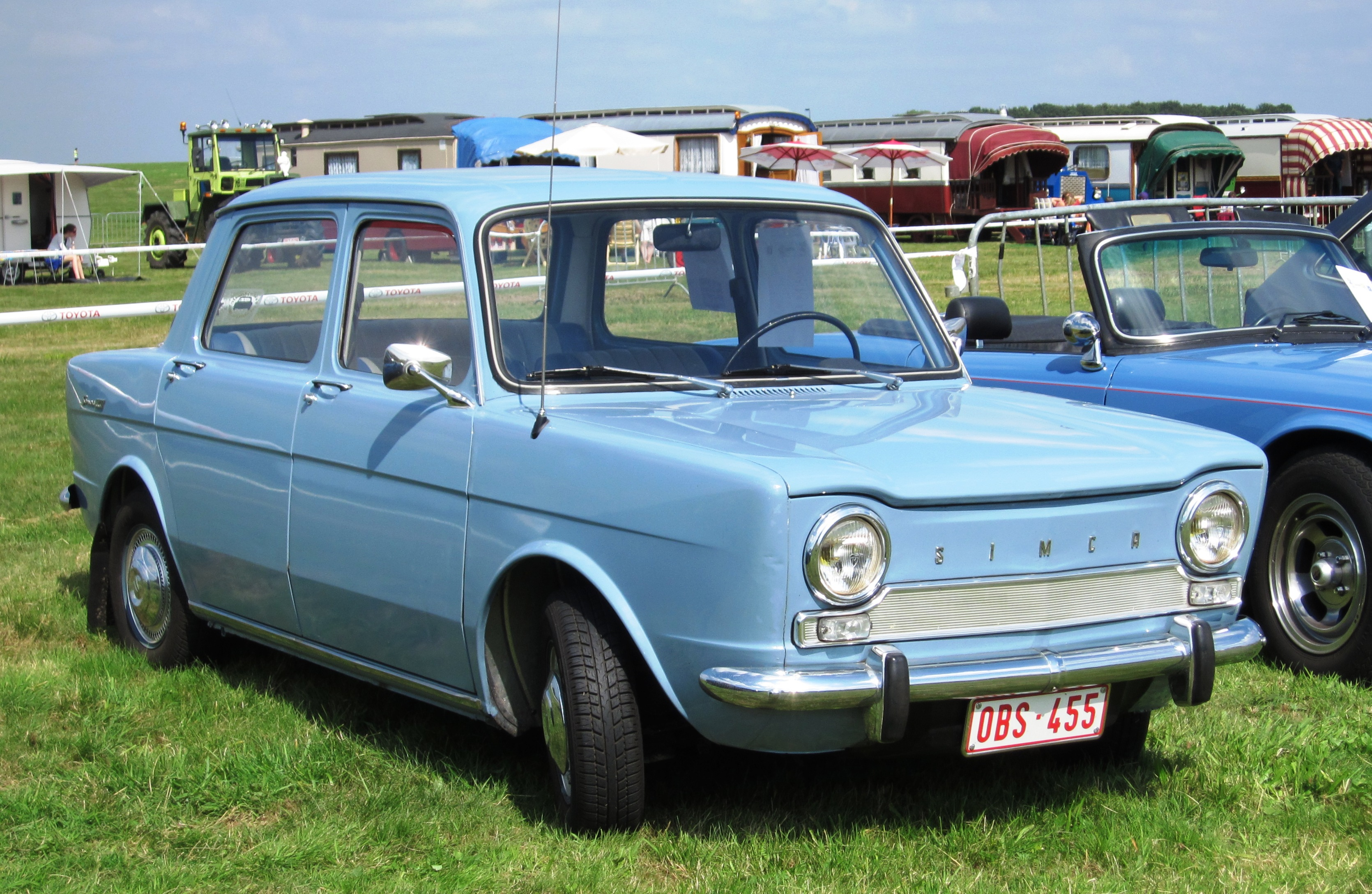 Simca Mille ca 1965